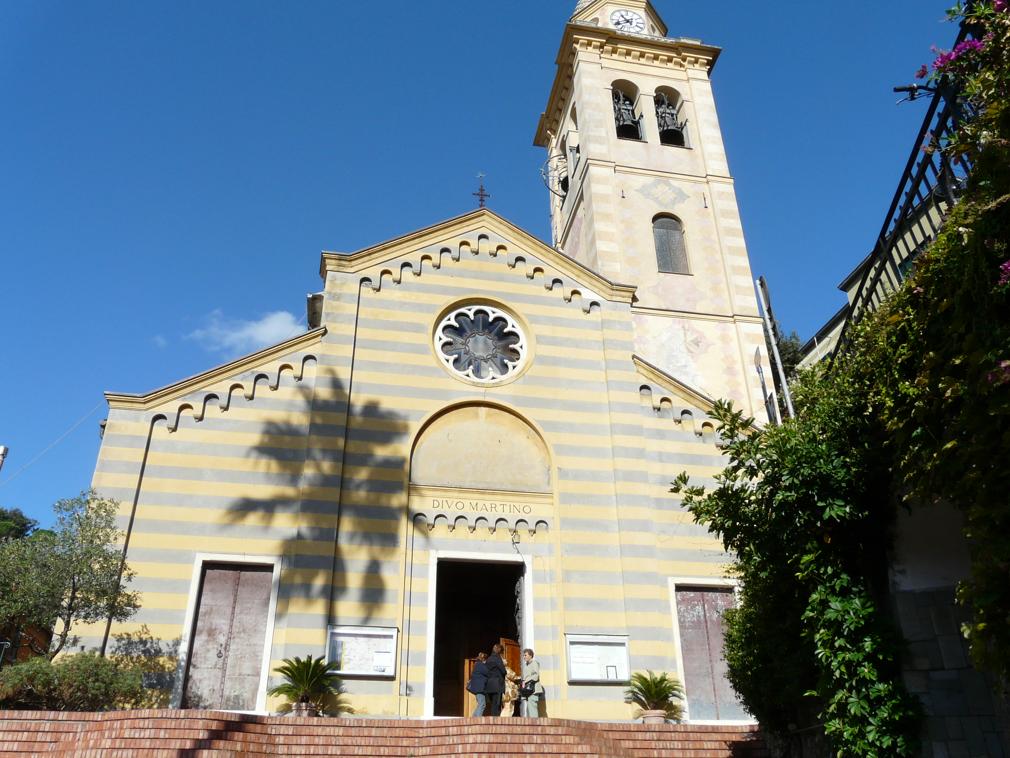 Chiesa di San Martino, Portofino, Liguria, Italia